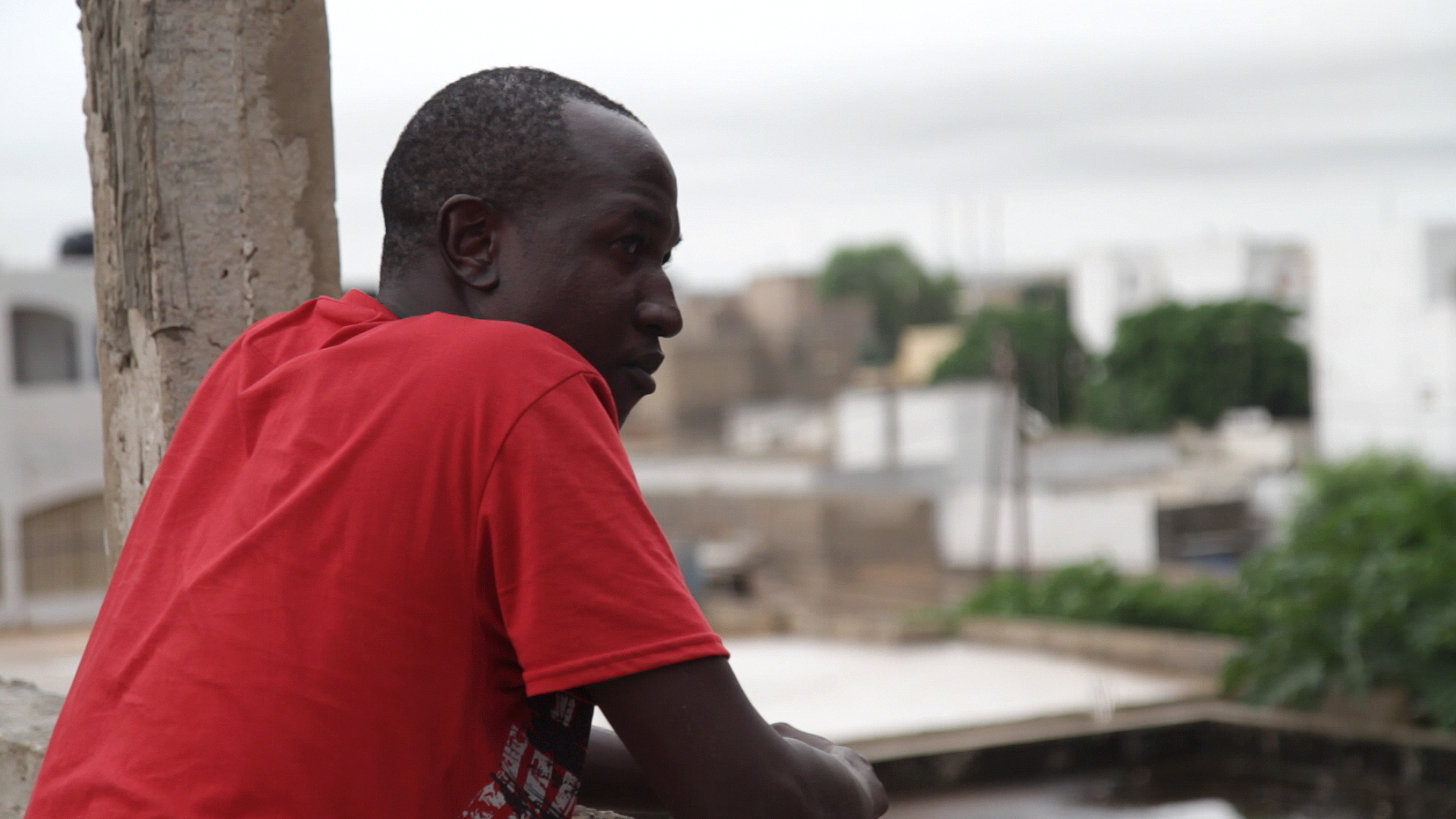 Dia à Rufisque dans la banlieue de Dakar. Image tirée du film « Le monde est comme ça » de Fernand Melgar.